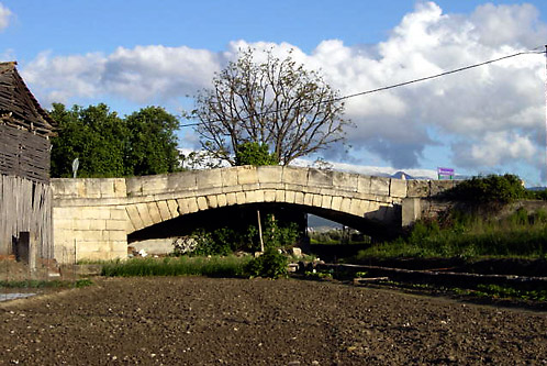 Puente del Francés, en Vegas del Genil (Granada, España)